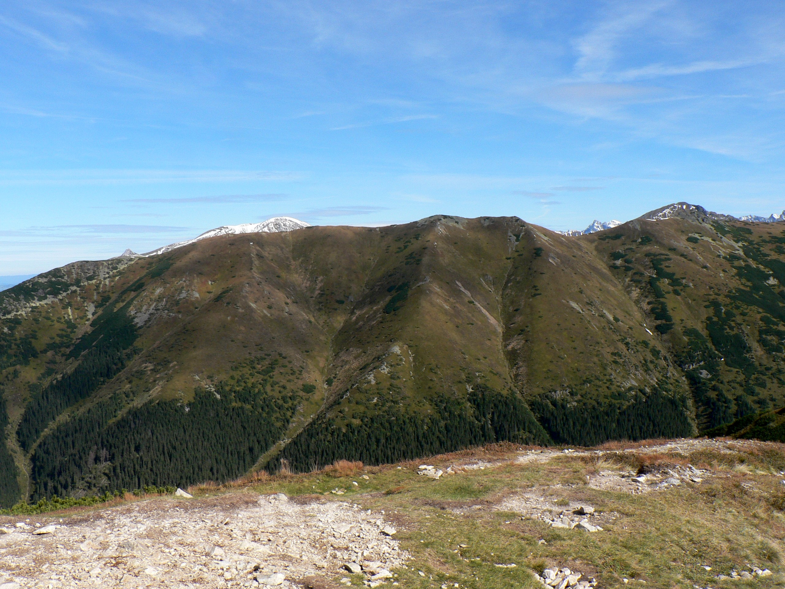 Widok na Ornak z Trzydniowiańskiego Wierchu